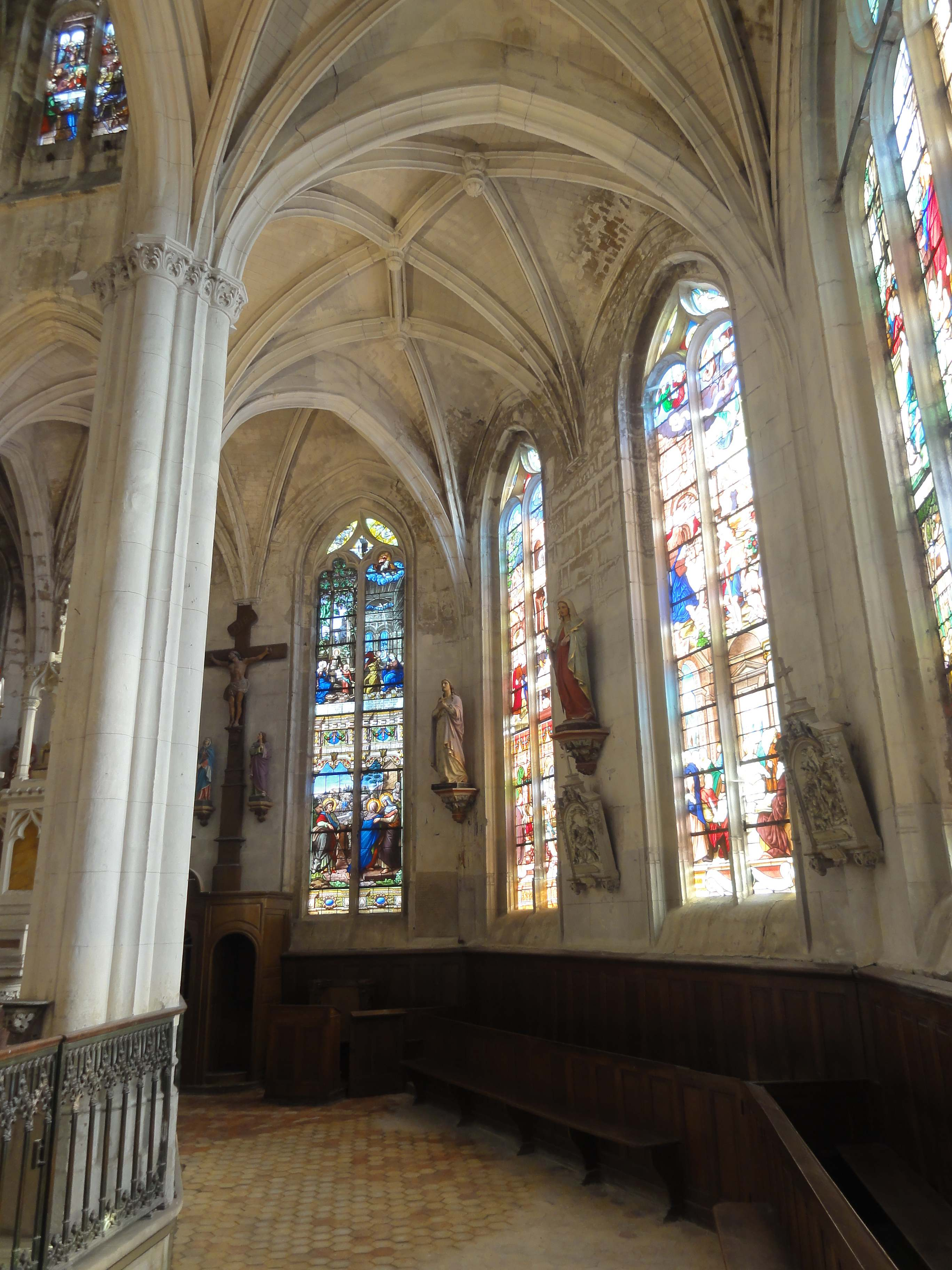 Intérieur de l'église - voir titre.